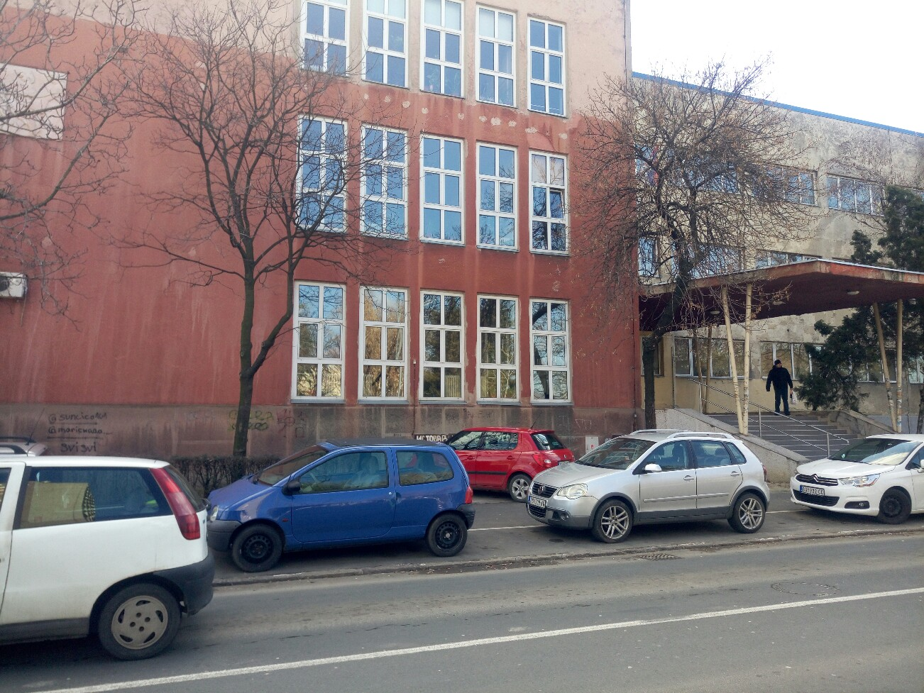 Зграда школе